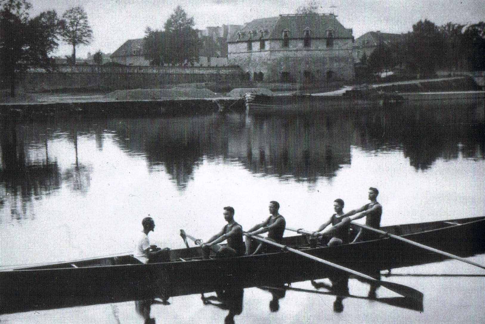 Des canotiers de la Sport Nautique Bisontin, sur le Doubs.